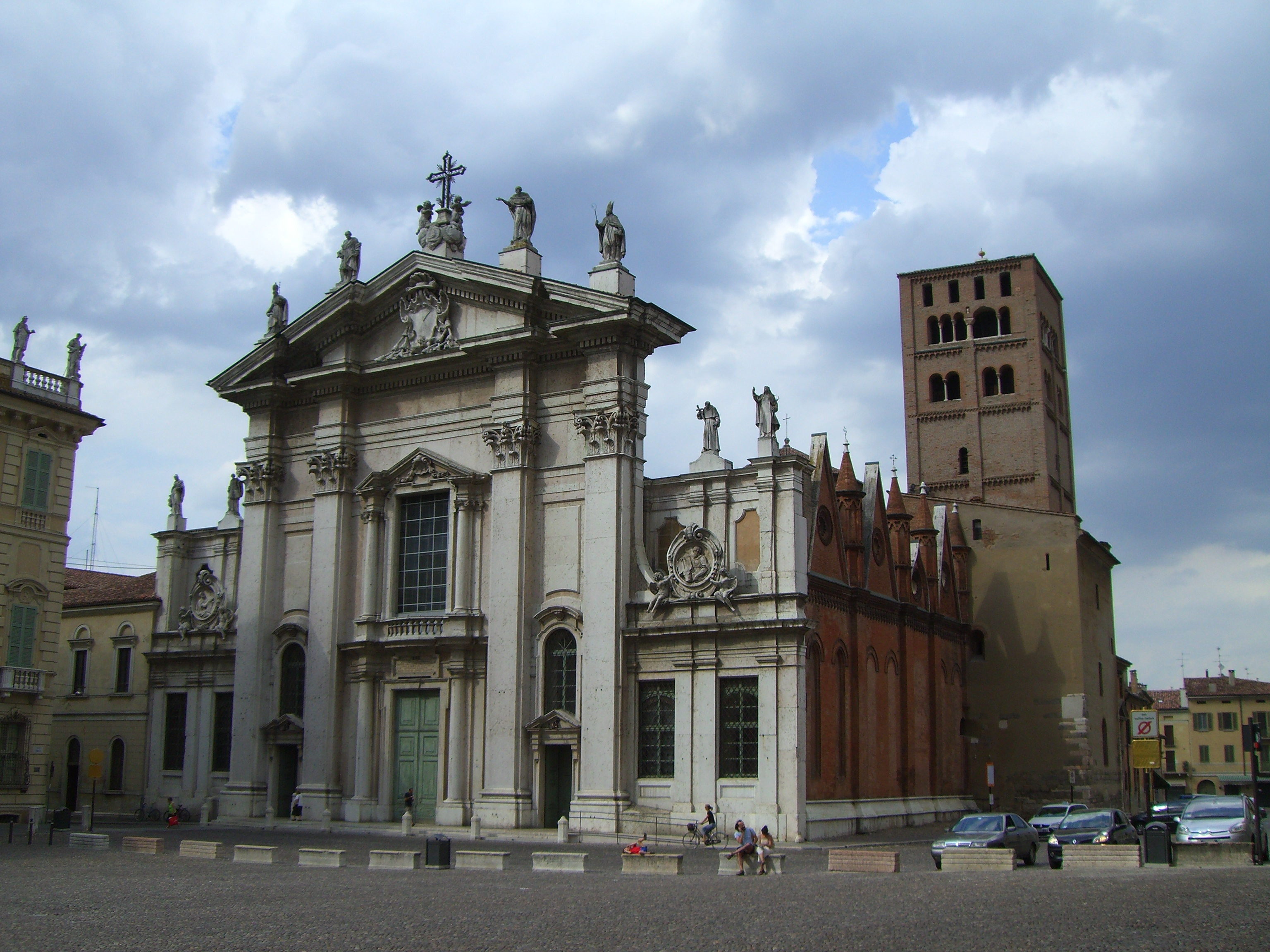 Mantova, Duomo. Immagine di mia proprietà rilasciata con licenza GFDL.